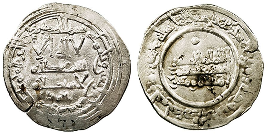 Dírham de Abd-ar-Rahman III. En plata. Encunyada l'any 348 de l'Hègira a Madīnat al-Zahrā.